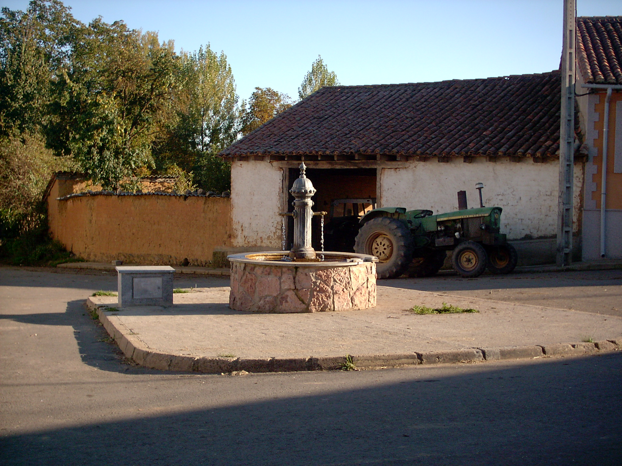 nuevo caño de villacidayo